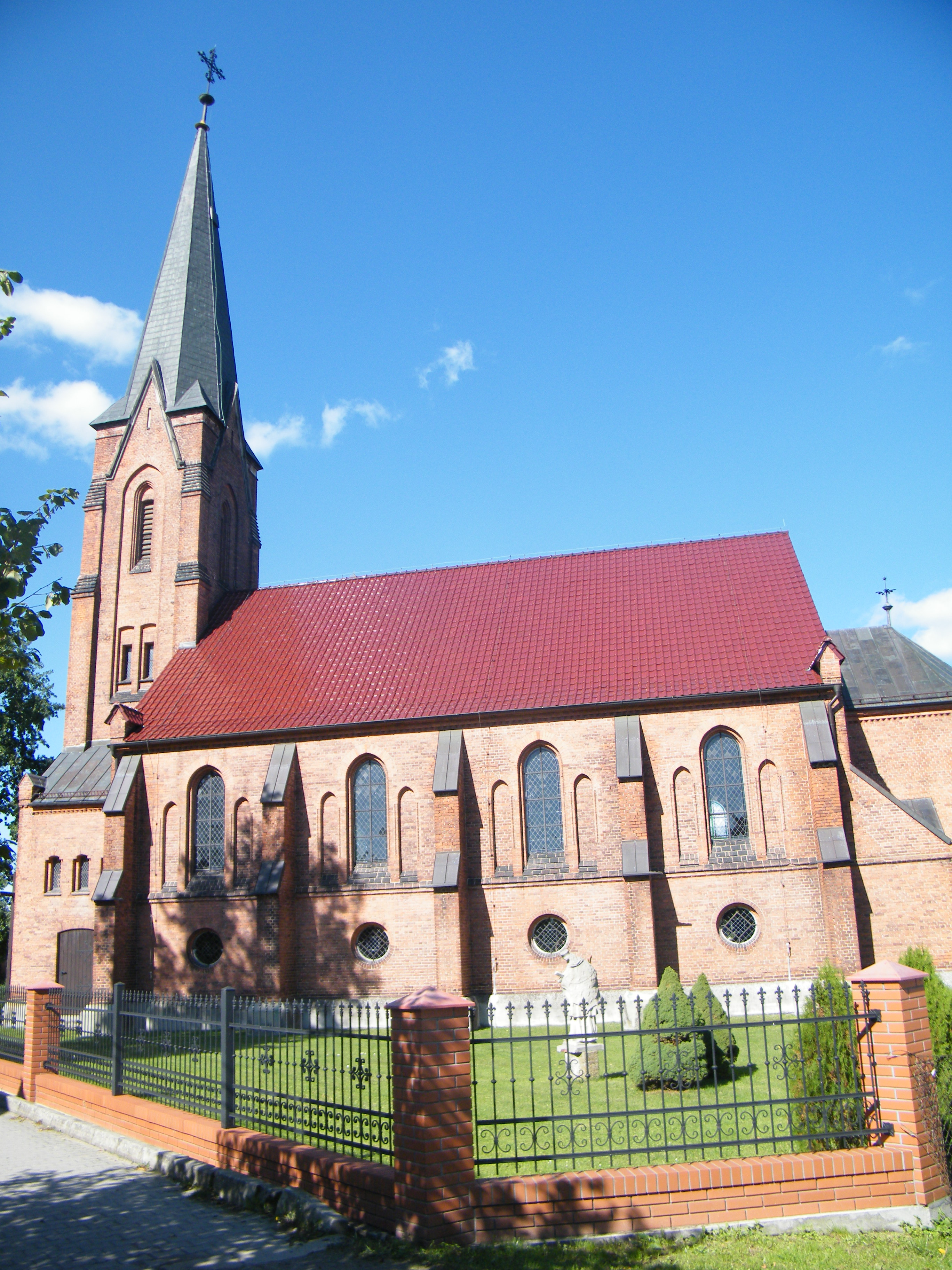 kościół ewangelicki, ob. rzym.-kat. par. p.w. św. Michała Archanioła Karłowice, Popielów 01.1960.